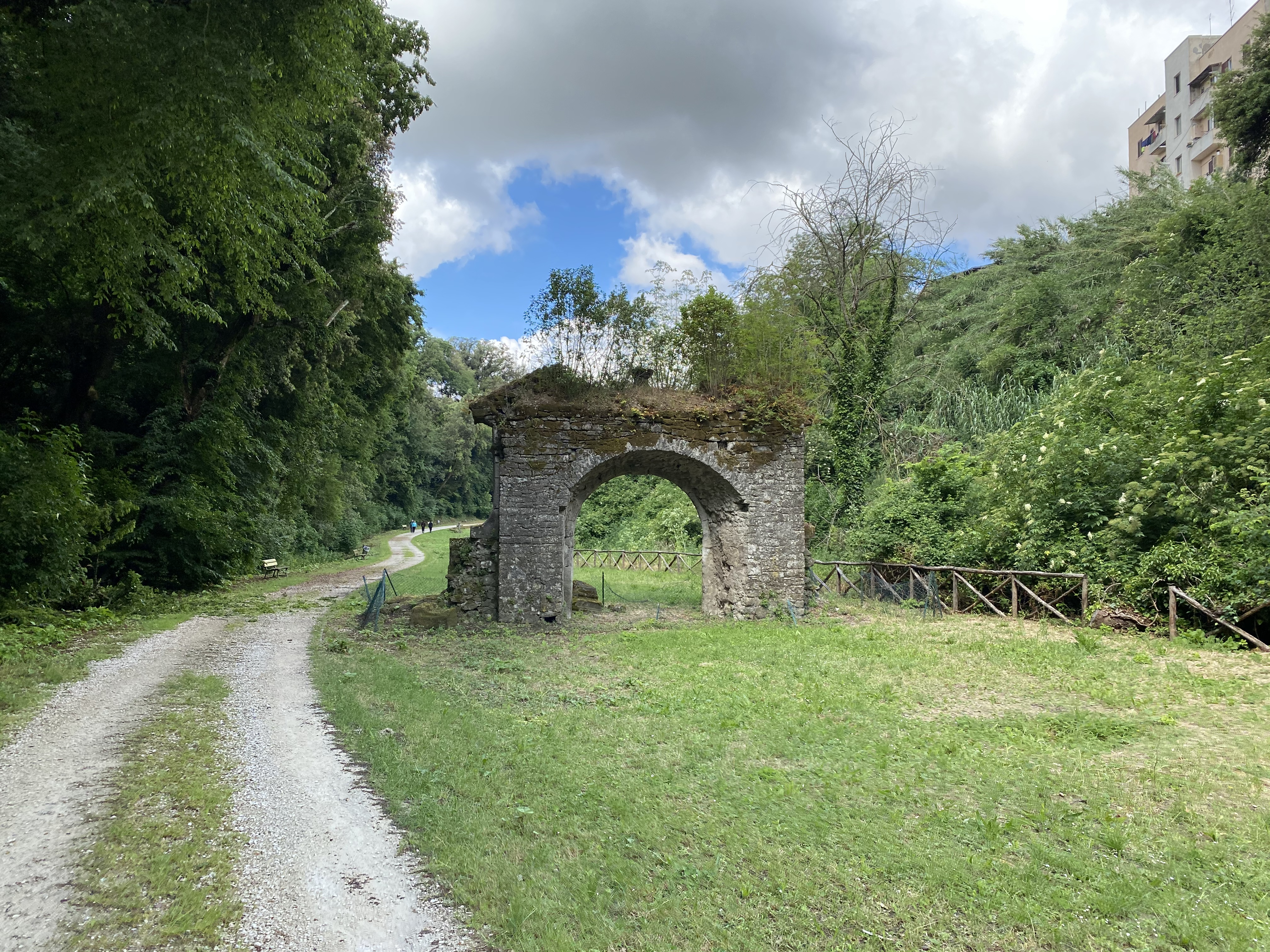 Barco Colonna a Marino